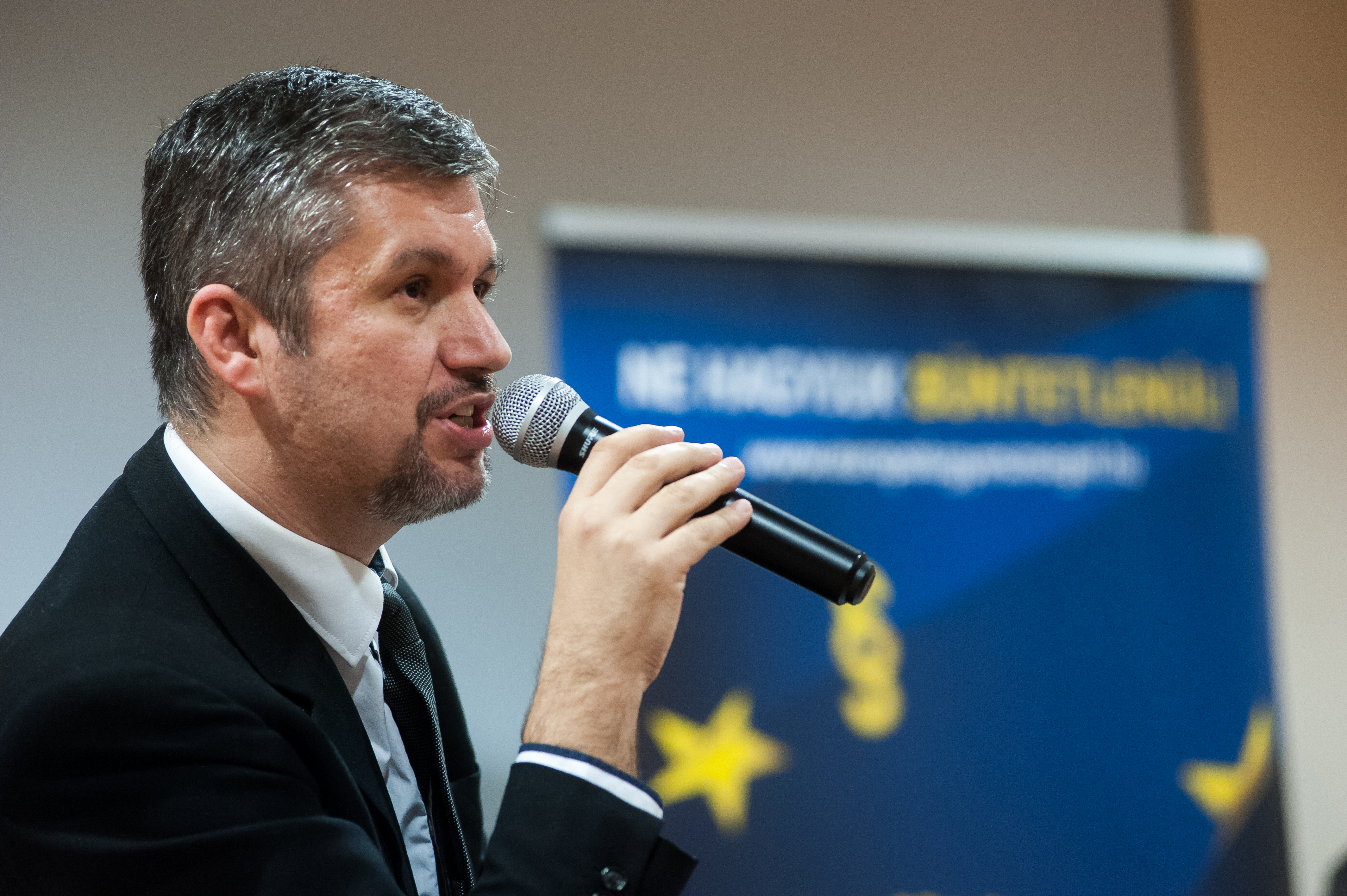 Hadházy Ákos a budapesti Lurdy Konferencia és Rendezvényközpontban.